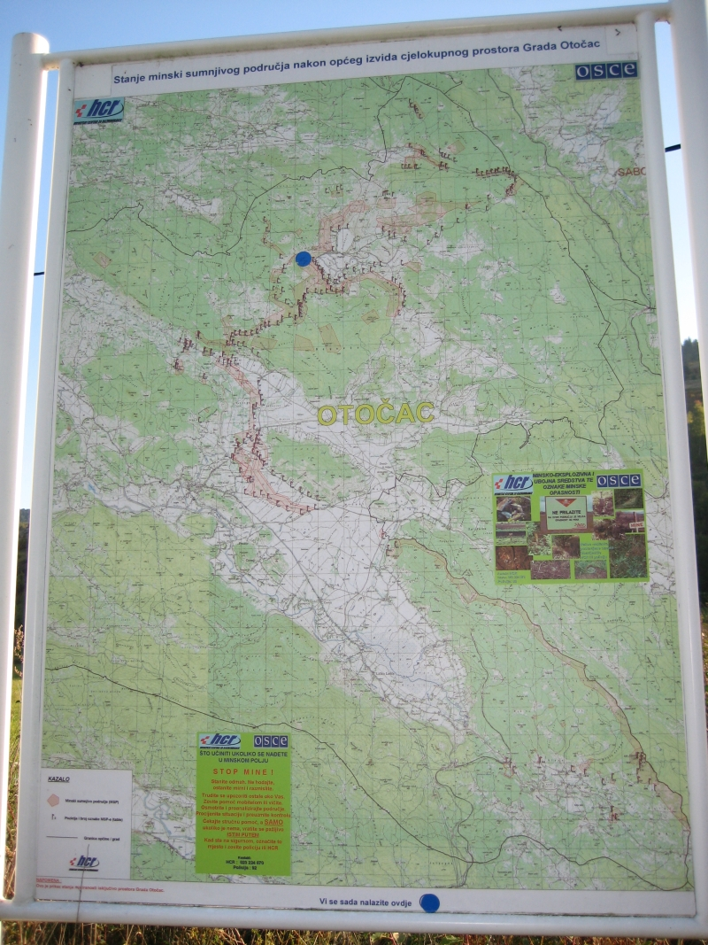 Stanje minski sumnjivog područja nakon općeg izvida cjelokupnog prostora Otočac, ploča u Dabru